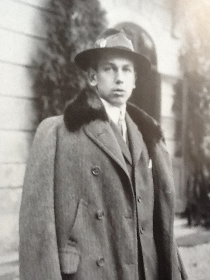 Erzherzog Albrecht im Park des Erzherzog-Friedrich-Palais zu Pressburg, etwa zwischen 1912-1915 (mit Genehmigung des Corvina Verlages Budapest, aus dem Buch Photo Habsburg, Bild 101)